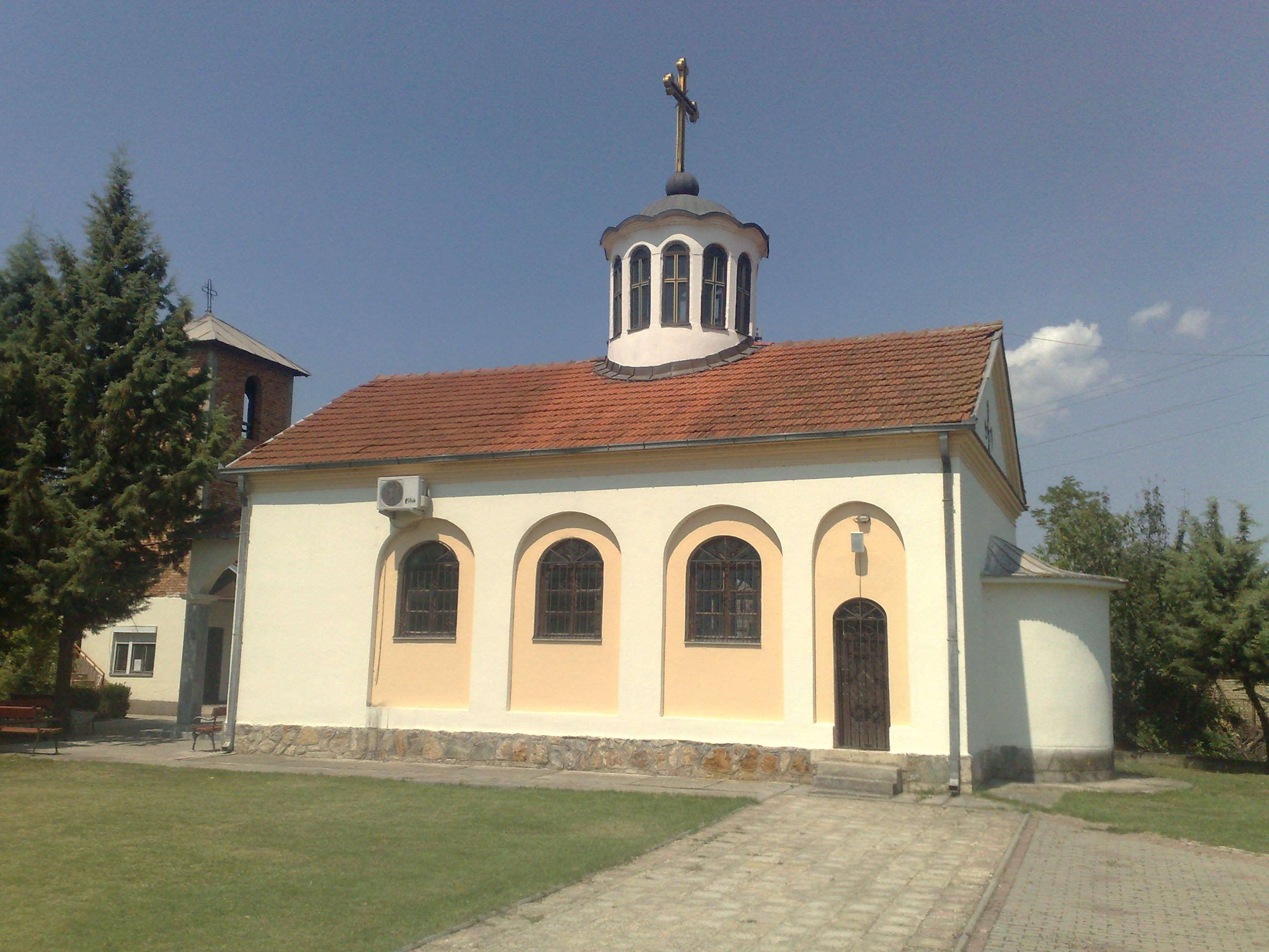 Црквата Св. Петар и Павле во Јурумлери